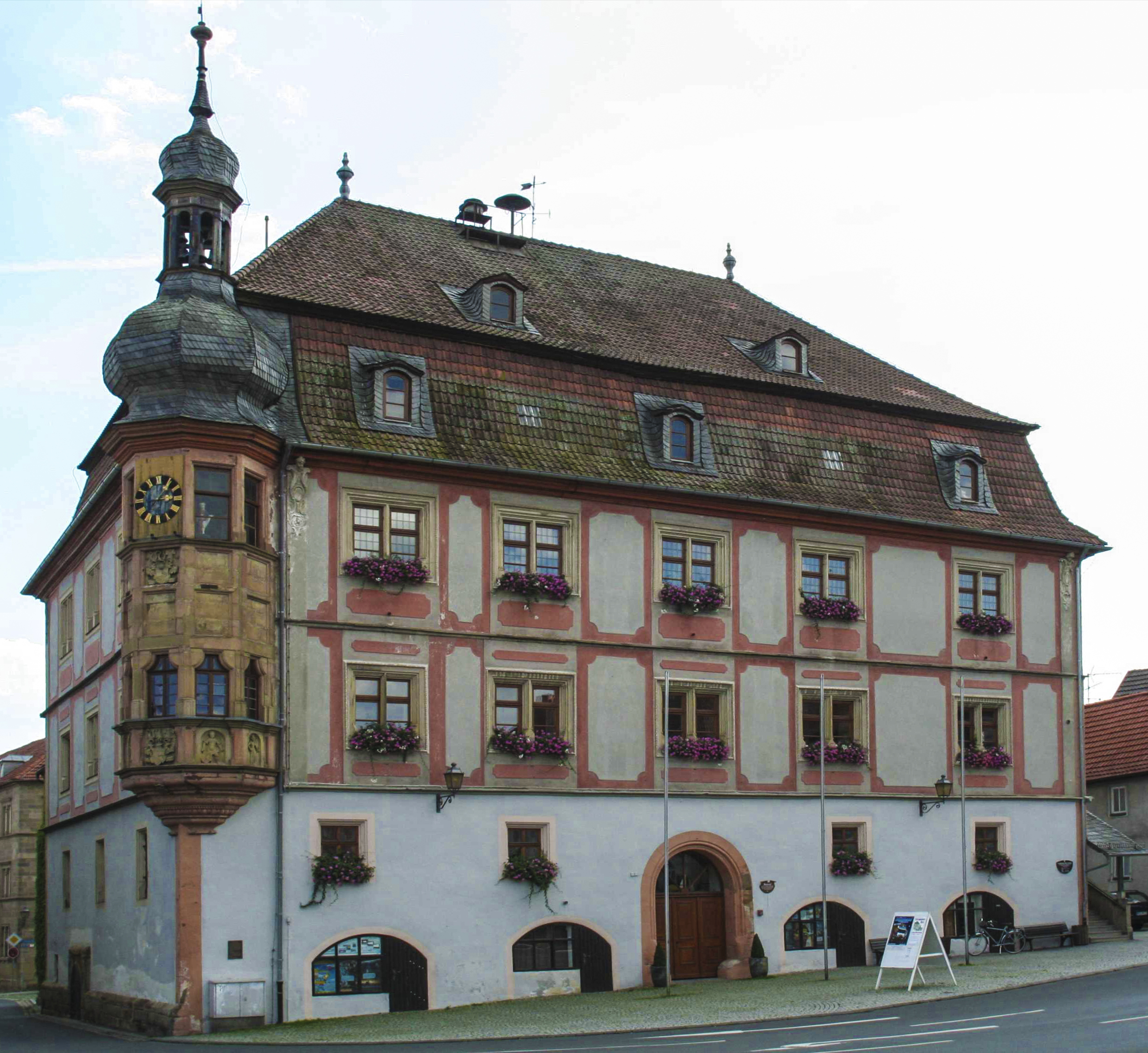 Rathaus Bad Königshofen im Grabfeld im Landkreis Rhön-Grabfeld in Bayern